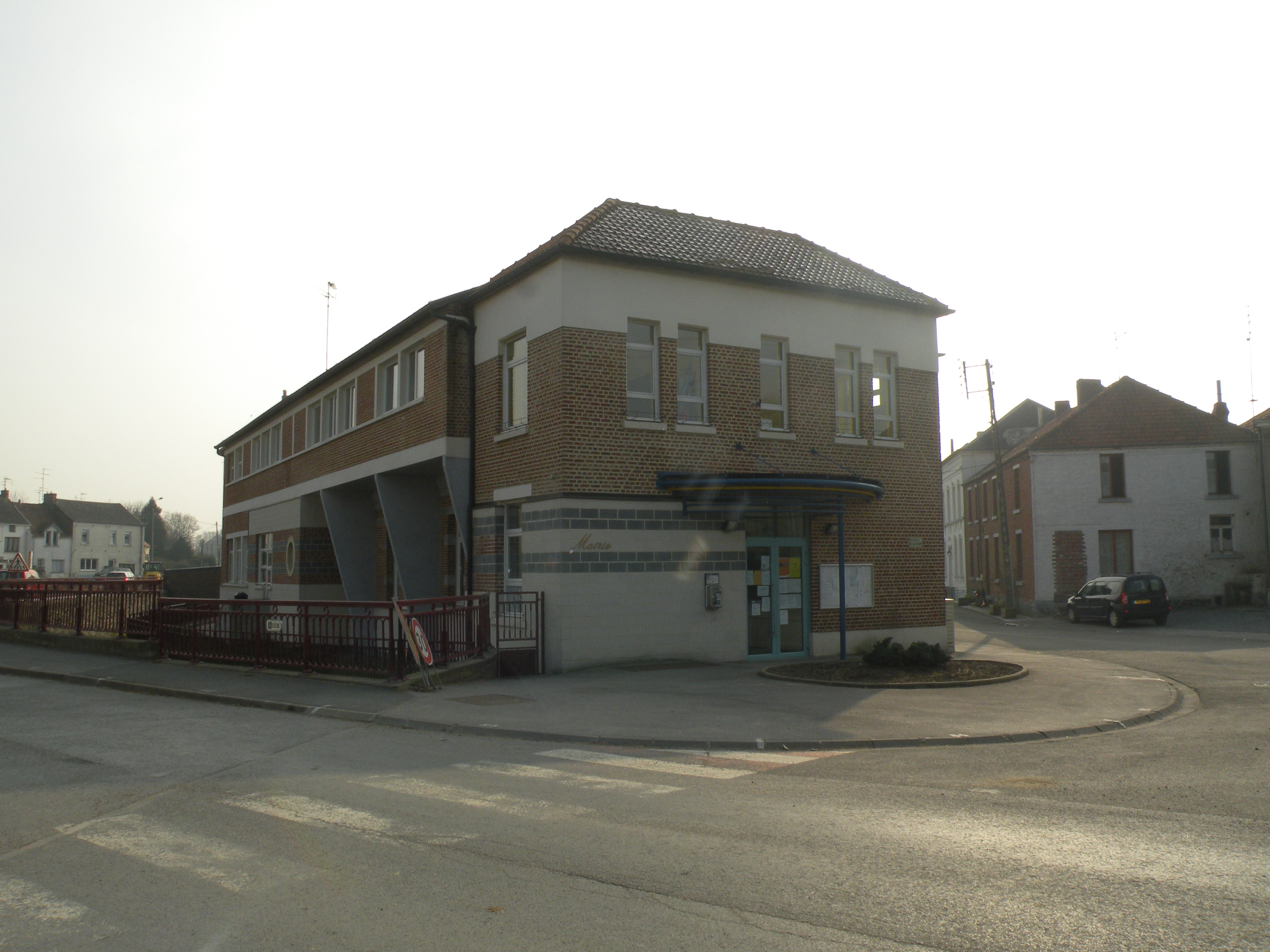 mairie de vieux-reng